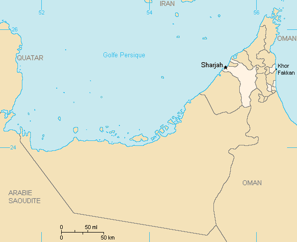 Description:Carte de l'émirat de Sharjah,Emirats arabes unis Auteur:Rémih